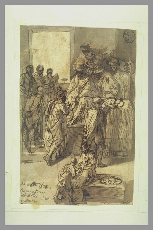 circoncision des hébreux à Ancône, Antonio Tempesta, Louvre